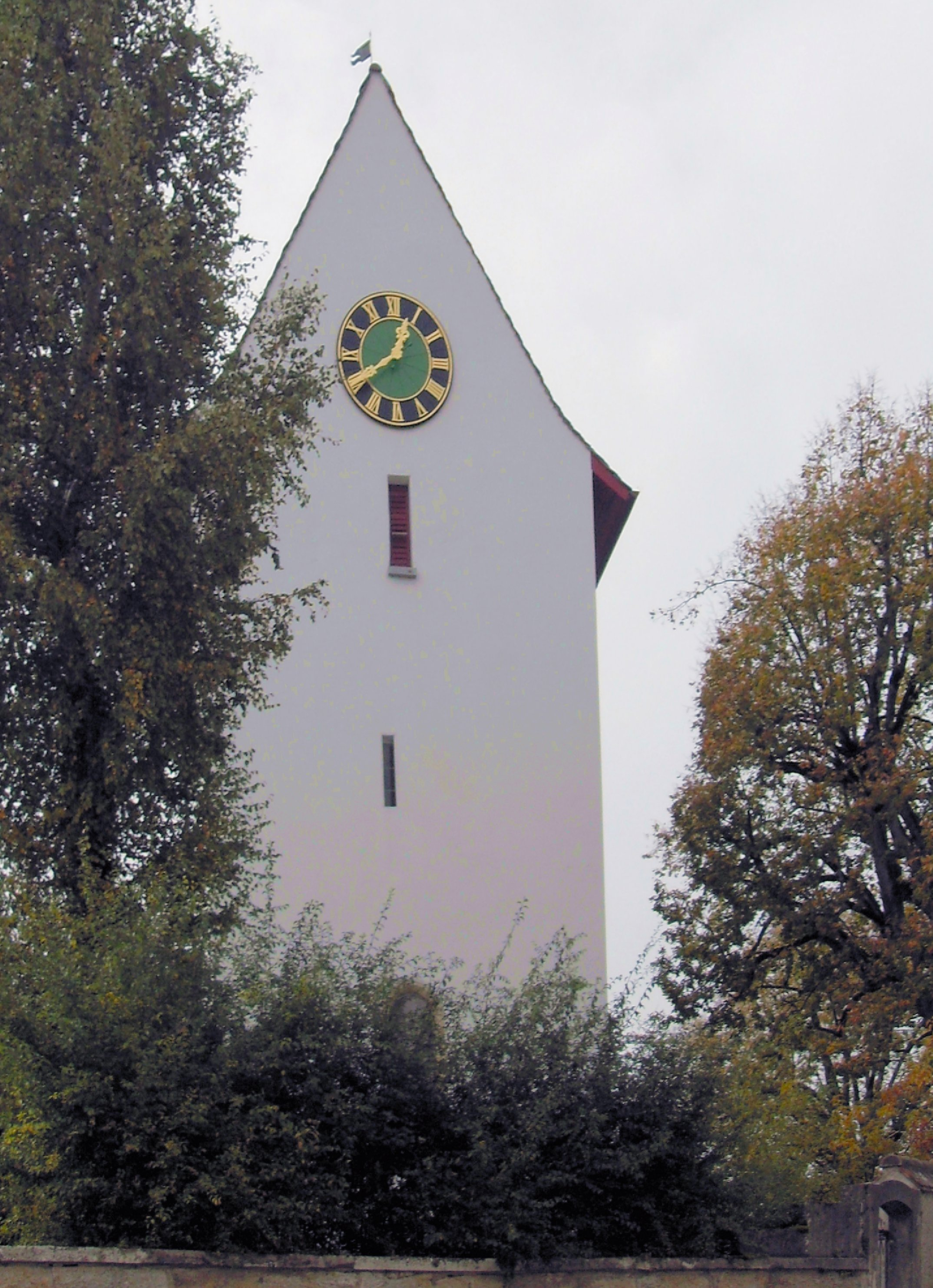 Turm der Kirche St. Martin in Lohn, Kanton Schaffhausen, Schweiz